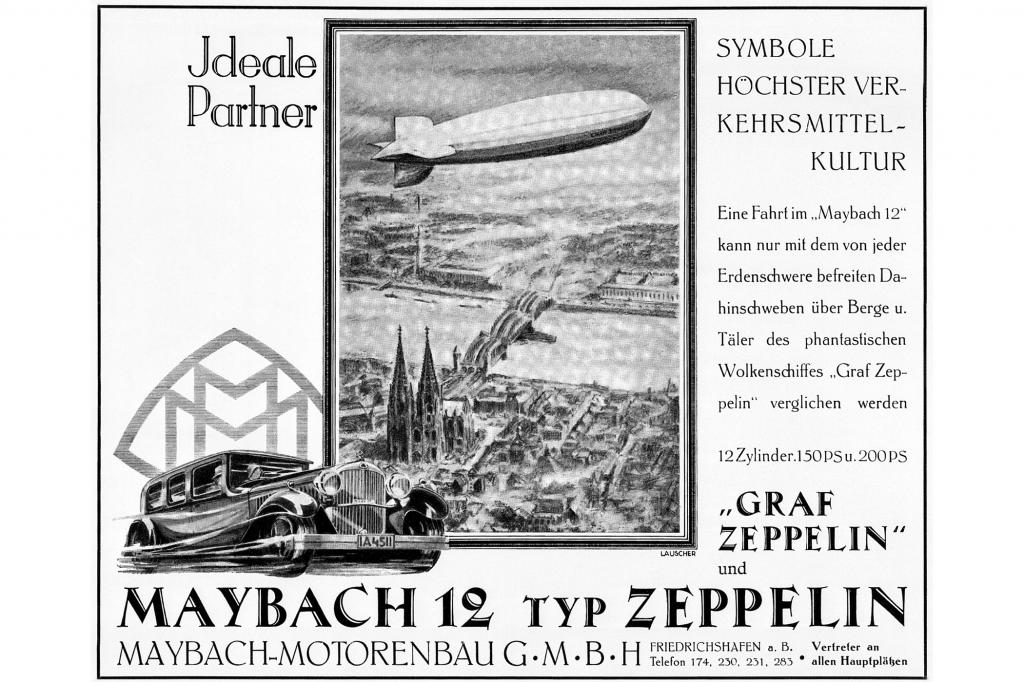 Maybach Motorenbau GmbH早年廣告 威廉·梅巴赫的長子卡爾·梅巴赫(Karl Maybach)除了參與齊柏林飛船(Graf Zeppelin)的引擎開發外，也自行創立了車廠專事高級車的生產。在他們替Maybach 12 Typ Zeppelin（1929年車款）刊登的平面廣告上，特別強調該車款承襲自齊柏林飛船技術水準的正統性。